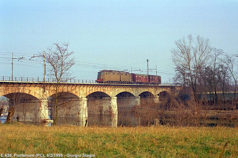 Il ponte della ferrovia Milano-Bologna sul torrente Nure nei pressi della stazione di Pontenure. È in transito un treno merci trainato da una locomotiva elettrica E.636.